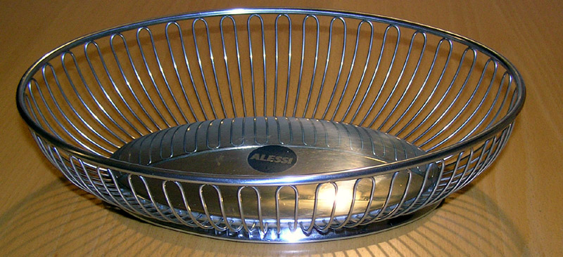 Alessi, oval wire basket, designed in 1955